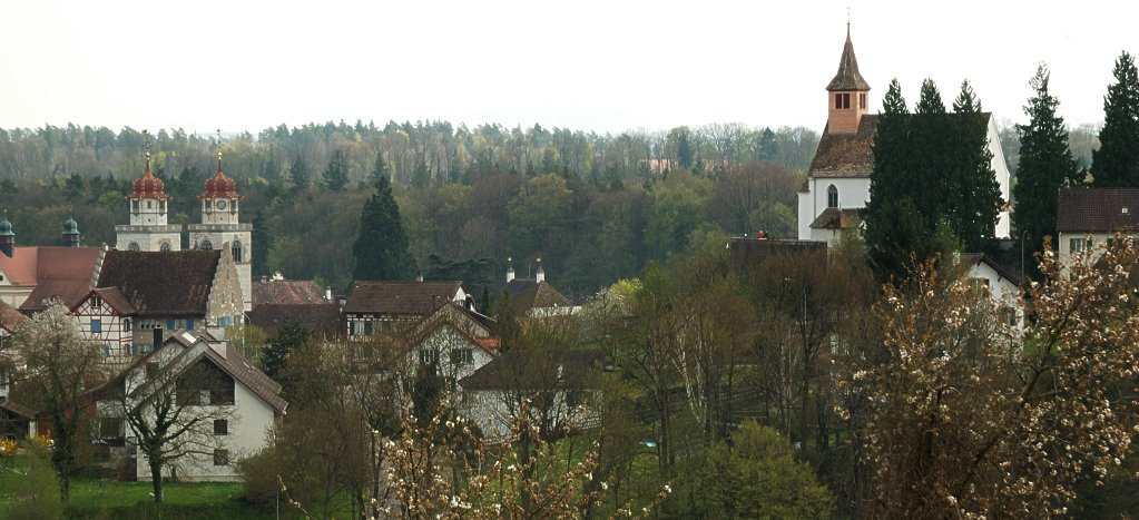 Rheinau gesehen von Westen